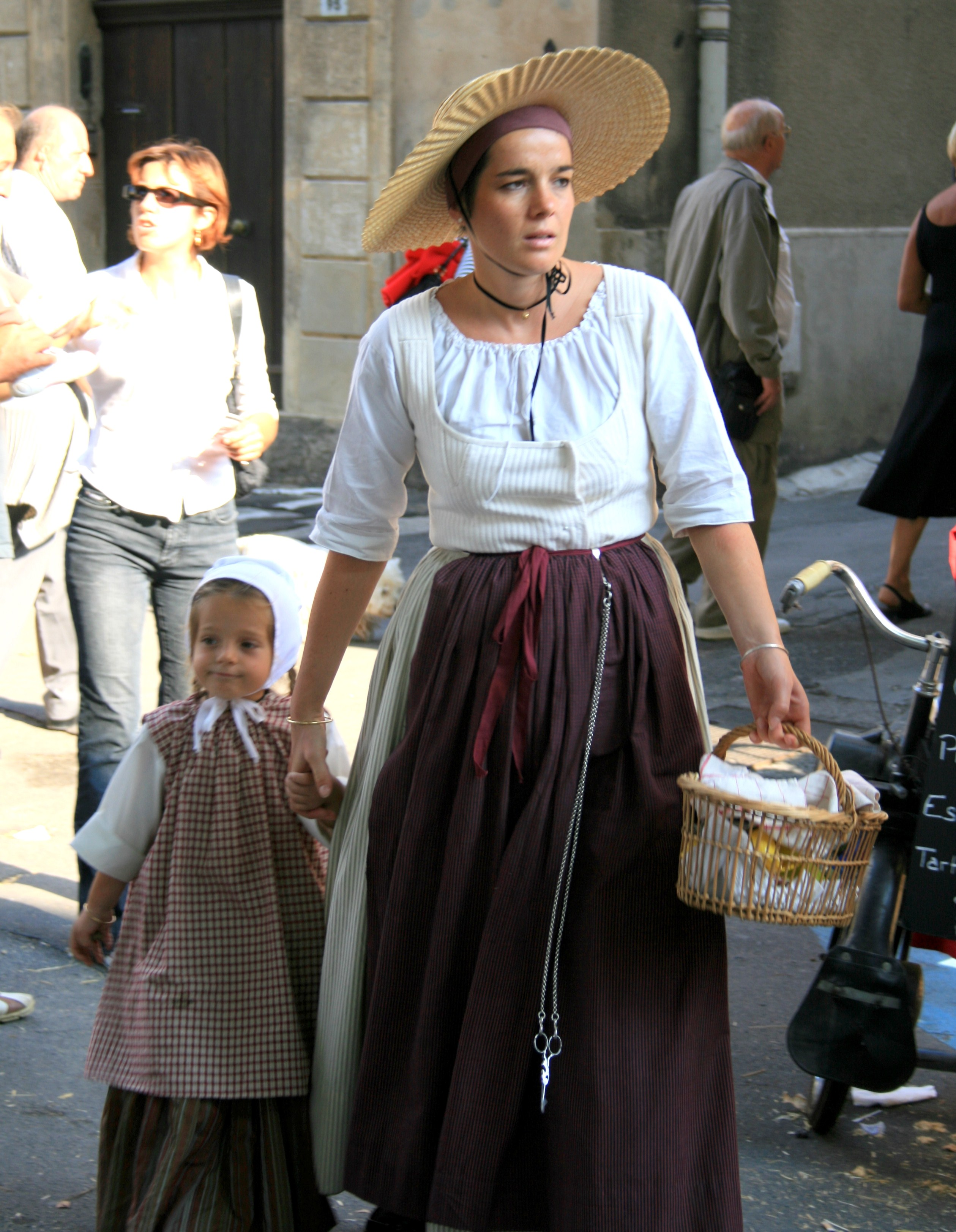 La chemise à manche logue